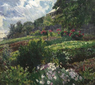 Garten an den Elbwiesen bei Dresden. Sign. und dat. unten links: Wilh. Claus 09. Öl auf Leinwand. 80 x 90 cm